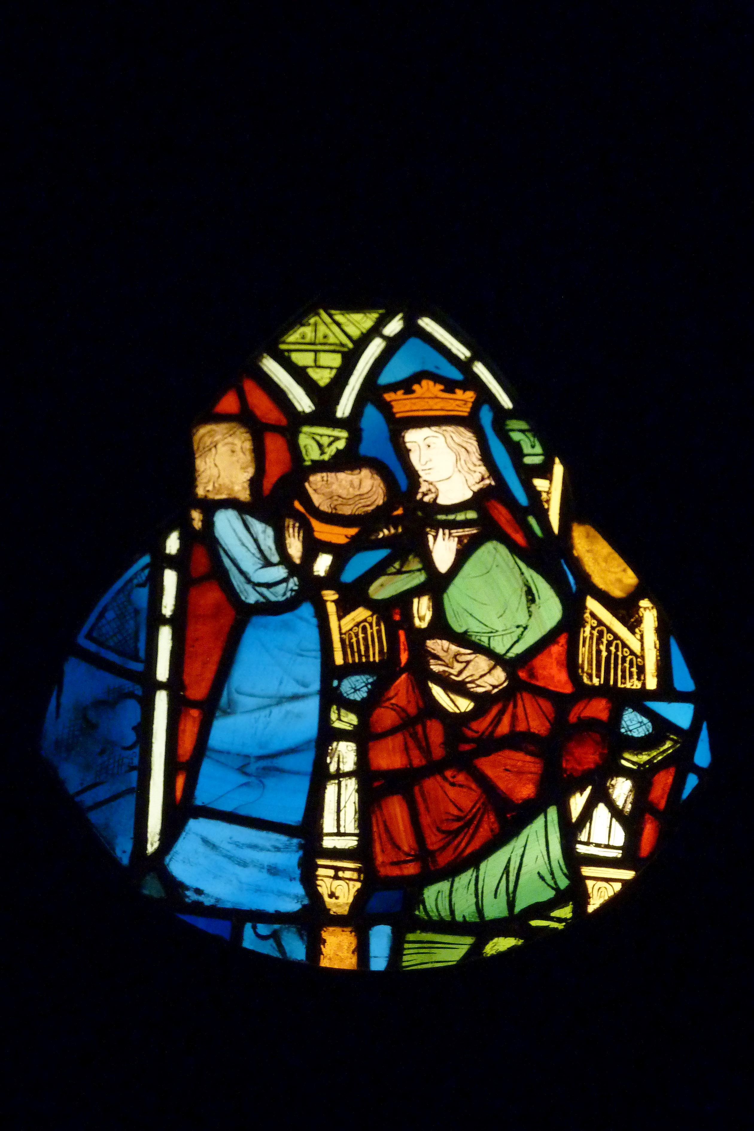 Bleiglasfenster im Musée National du Moyen Âge (Hôtel de Cluny) in Paris; Herkunft: Sainte-Chapelle in Paris, 2. Hälfte 13. Jahrhundert; Darstellung: Salomé bringt Herodias das Haupt von Johannes dem Täufer